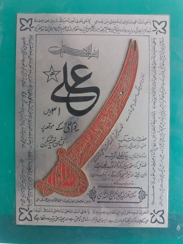 علامہ حسین بخش جاڑا اعلی اللہ مقامہ کو اکتیسویں یوم علیؑ کے موقع پر ملنے والا نشانِ خیبر شکن